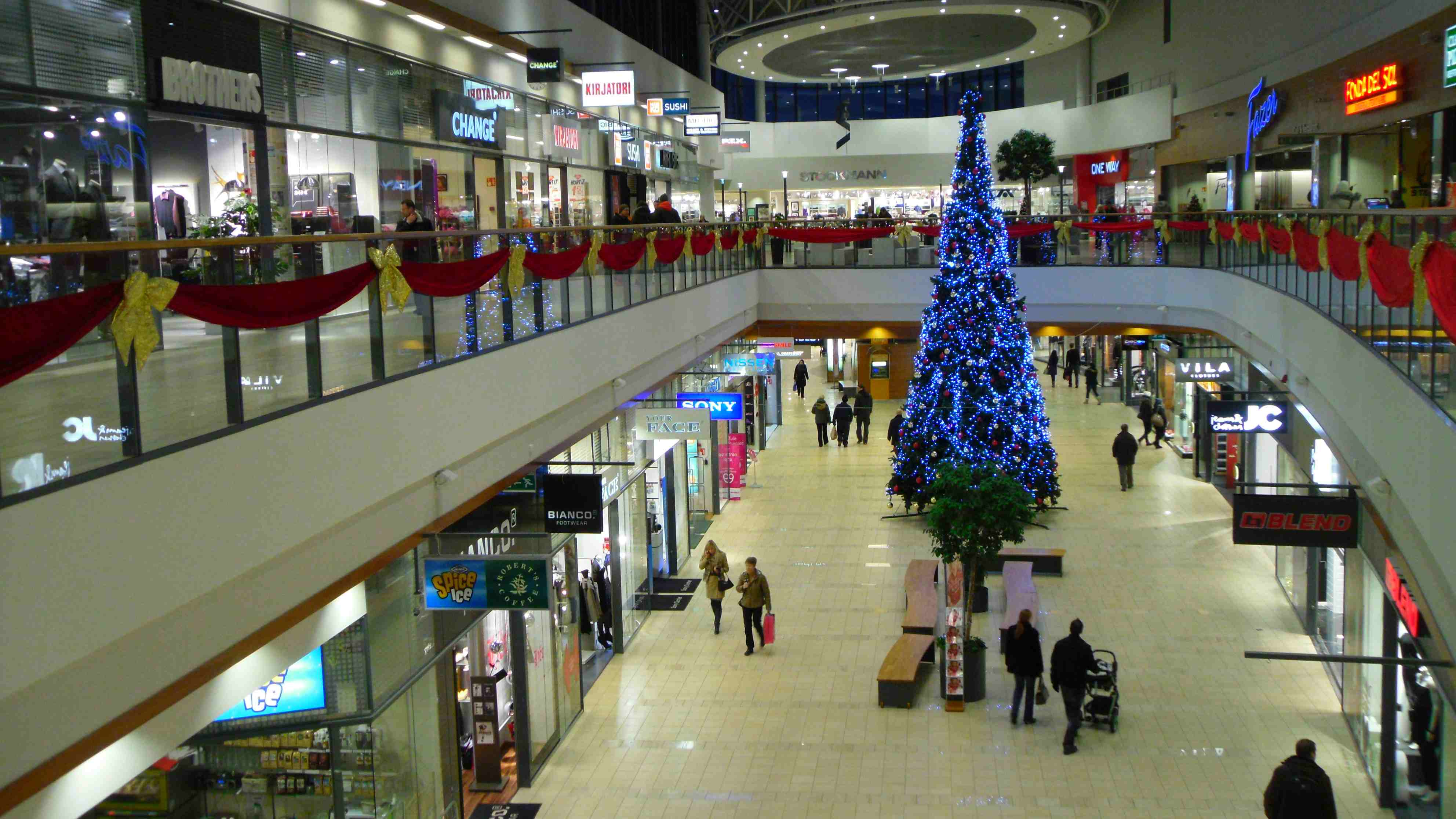 Jumbo Shopping Centre ist Finnlands zweitgrößtes Einkaufszentrum mit über 120 Geschäften auf 85.000 Quadratmetern Fläche und 7 Millionen Besuchern im Jahre 2006